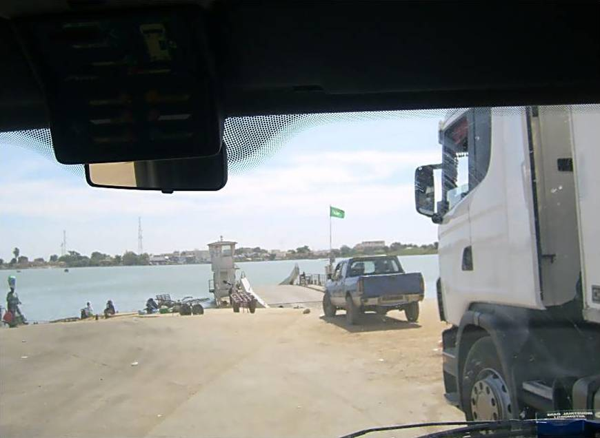 Frontiera di Rosso in Mauritania con il Senegal sull'omonimo fiume.